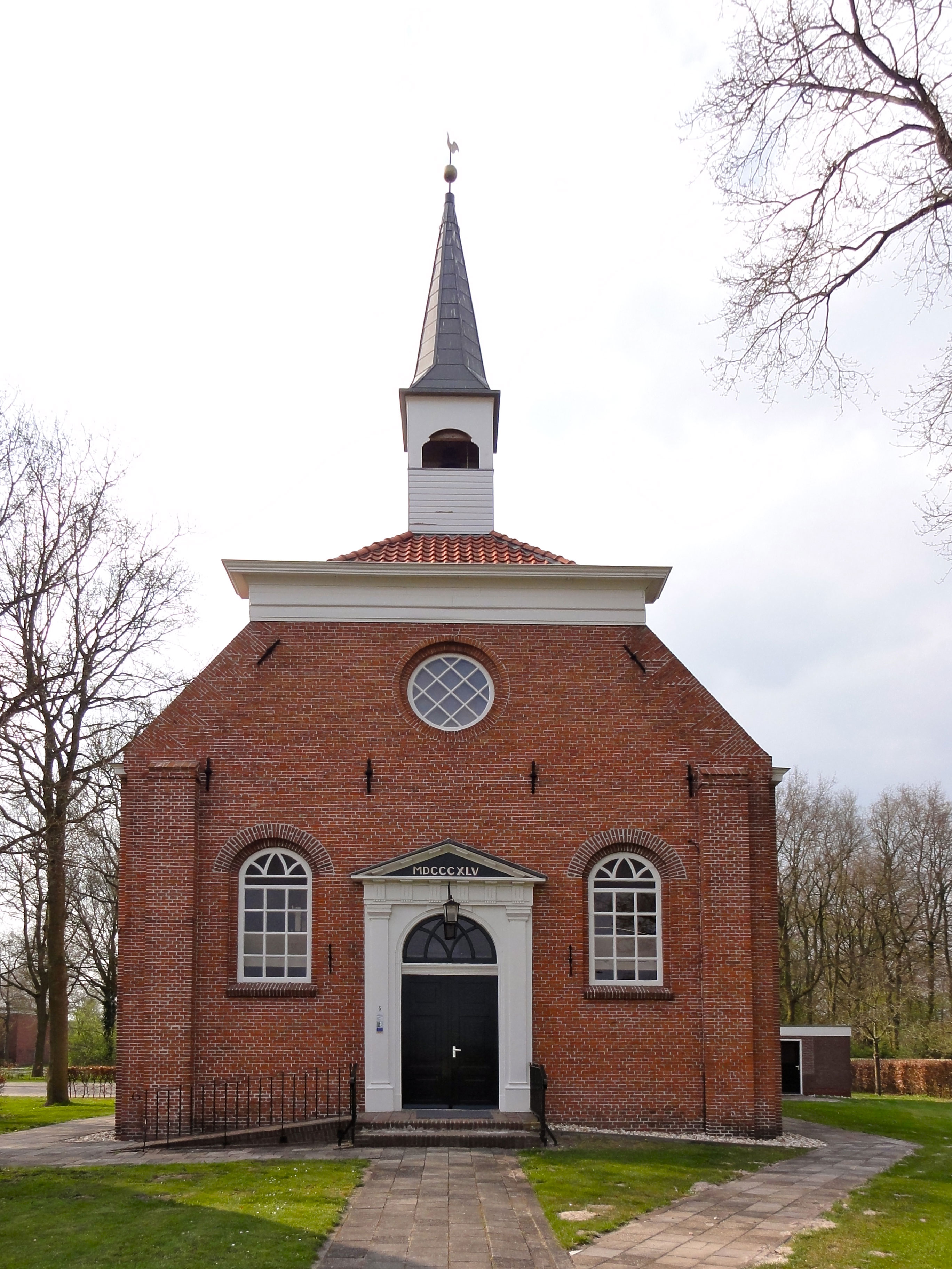 De kerk van Ommelanderwijk bij Veendam, een waterstaatskerk uit 1845